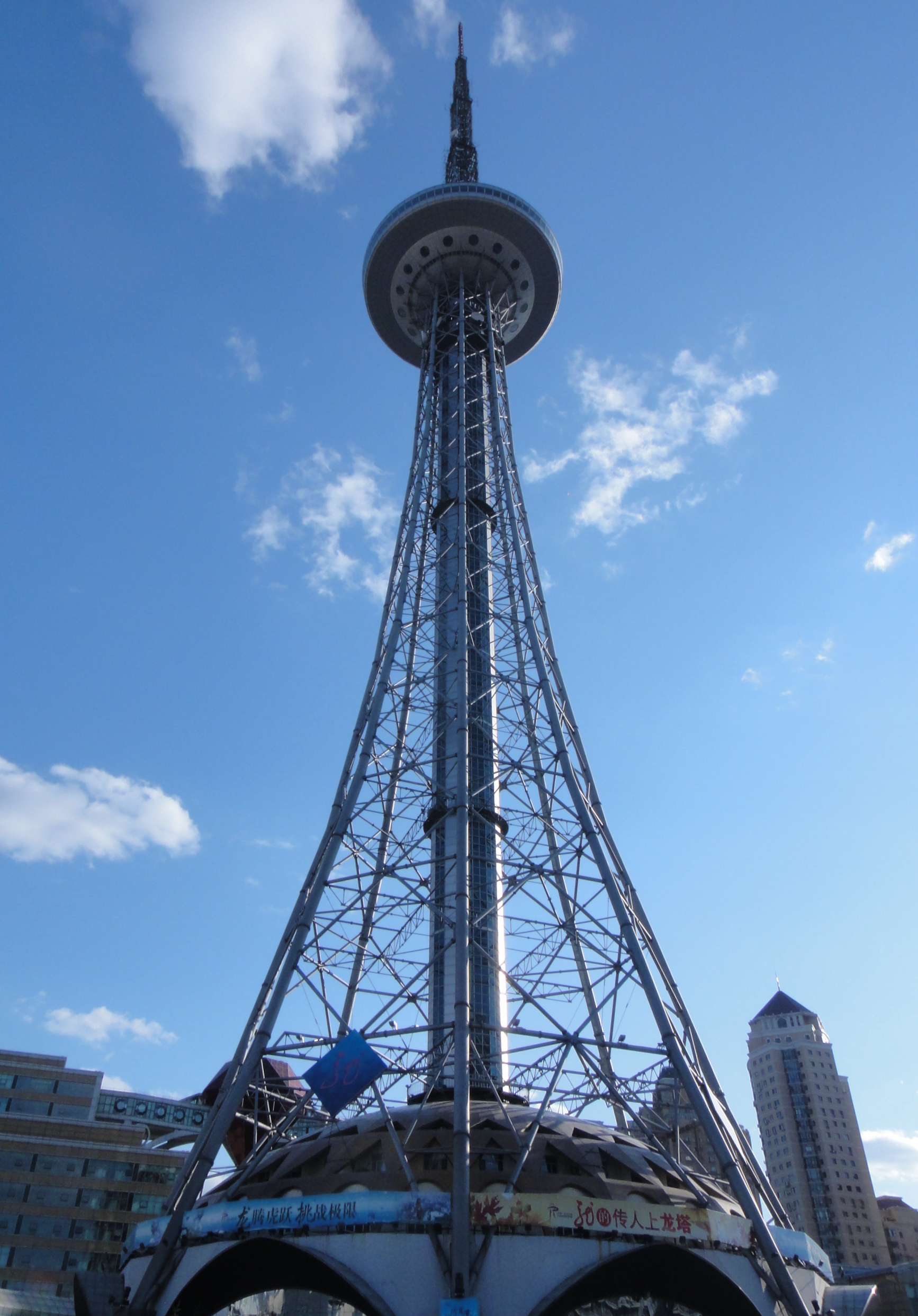 黑龙江省哈尔滨市龙塔